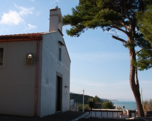 Chiesa di Santa Maria della Difesa a San Menaio, Gargano